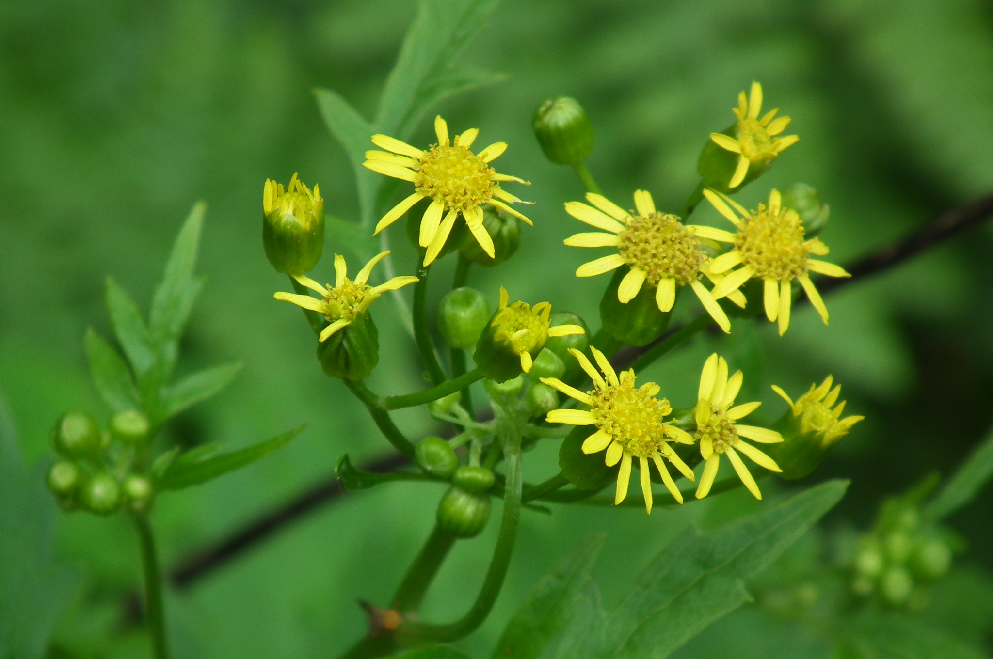 Senecio nikoensis サワギク,沢菊（ボロギク,襤褸菊）